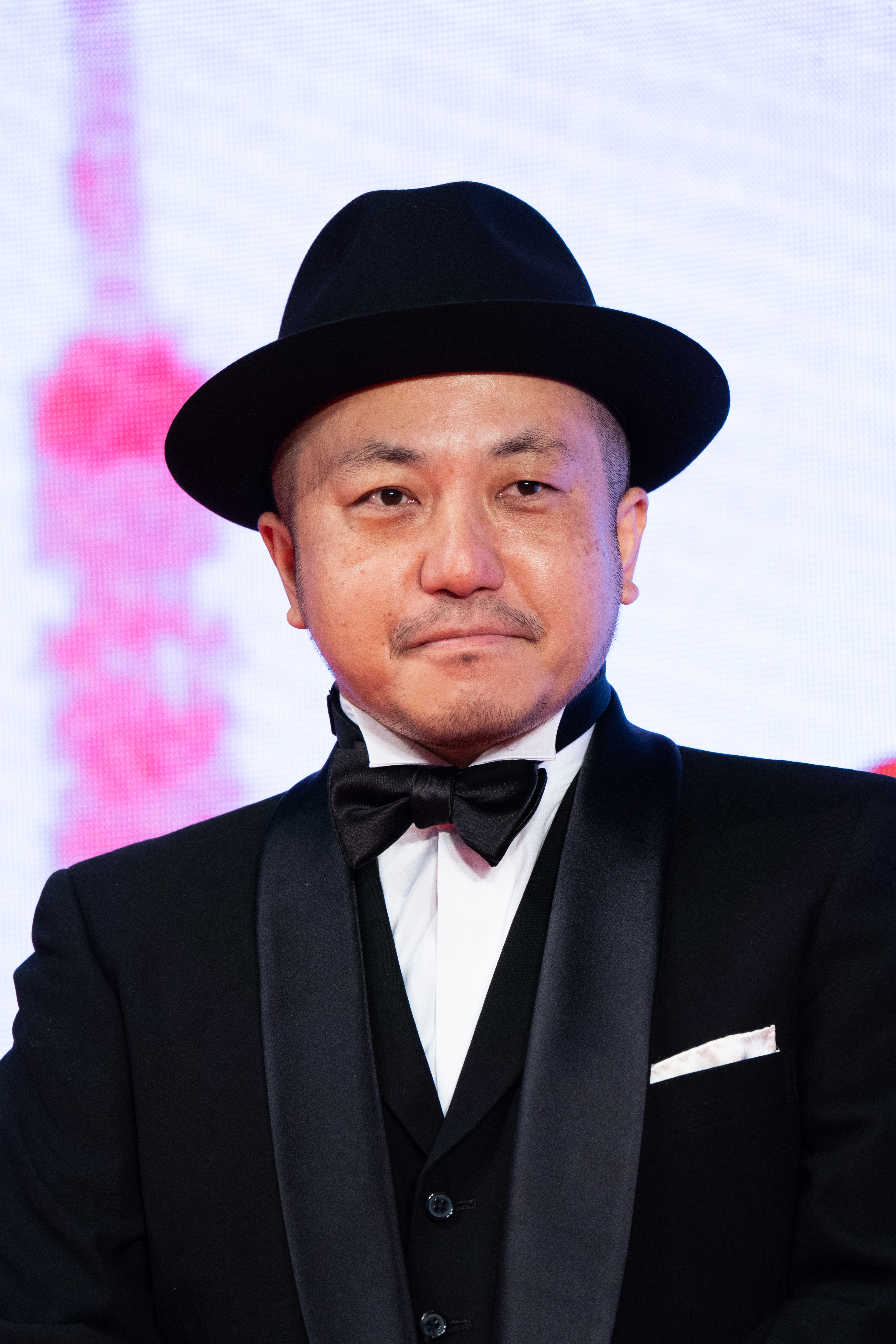 第32回 東京国際映画祭 オープニングセレモニー 白石和彌 (ひとよ)